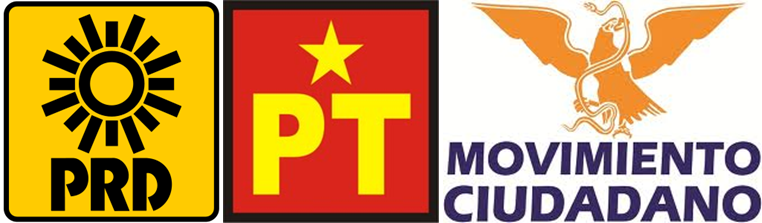 Andrés Manuel López Obrador y los partidos a los que representa. Coalición "Movimiento Progresista"